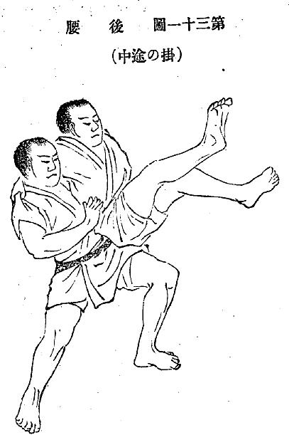 後腰